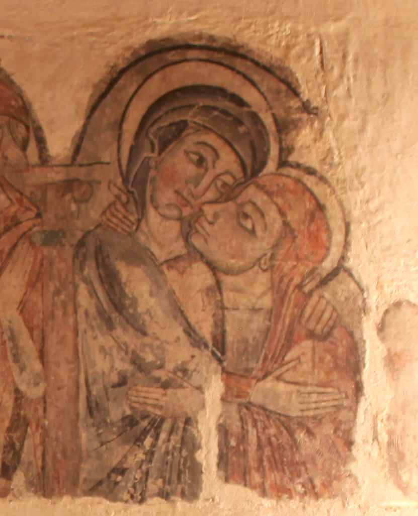 Detall de l'escena de la Visitació. Sant Martí de Puig-reig